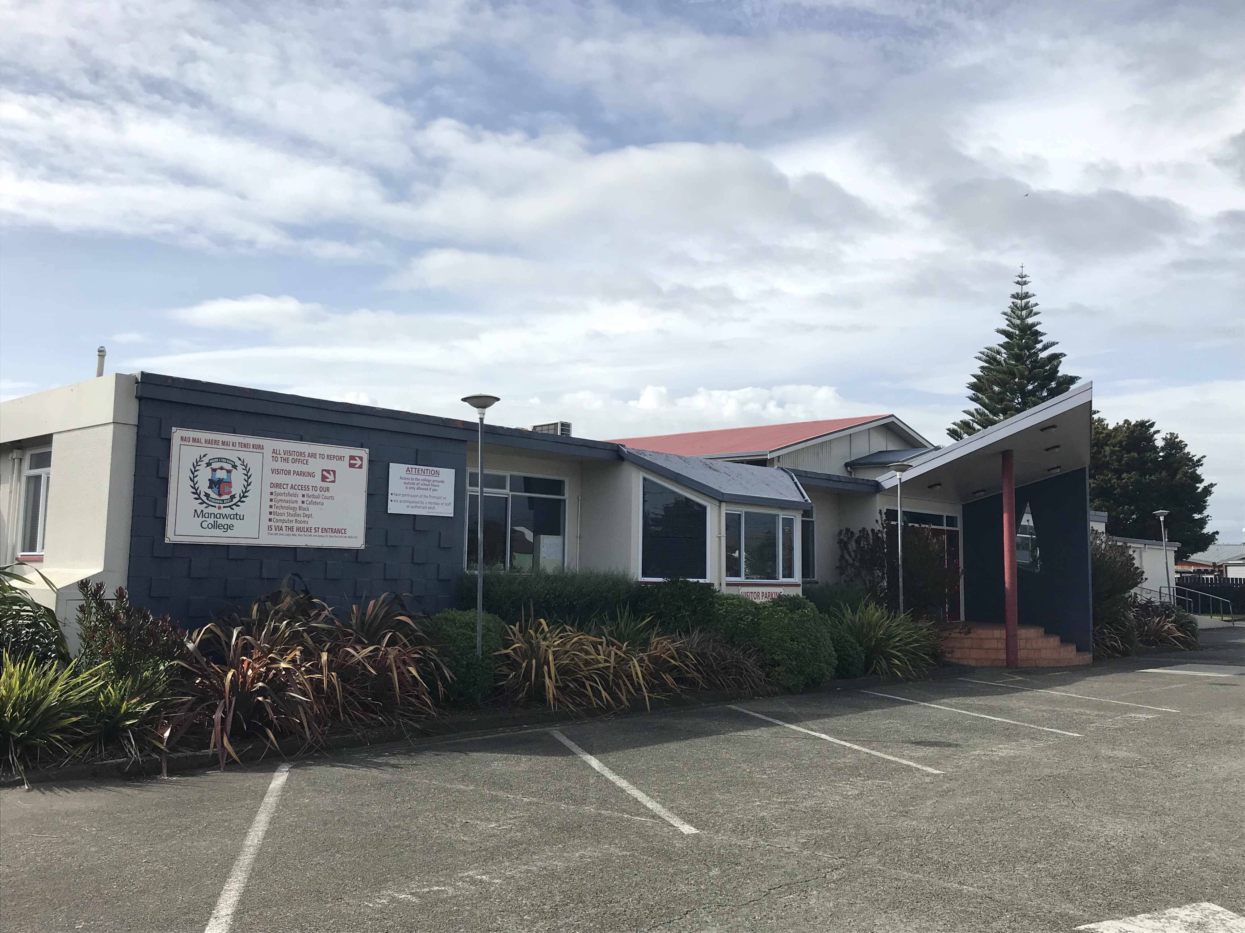 Manawatu College